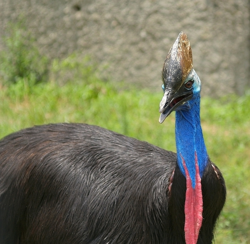 ヒクイドリ Casuarius casuarius Helmkasuar, Kasuarer, Cassowary, Casuario, Casoar, Casuarius, Kasuarissen, Casuar, Kazuar, Kypäräkasuaari, Kasuar Location 大阪市天王寺動植物公園 Tennouji Zoo, Japan Copyright OpenCage